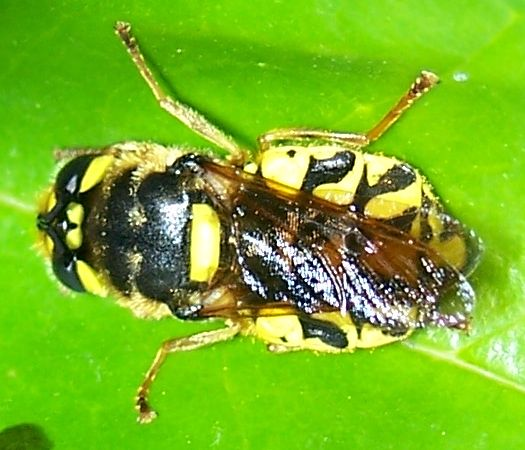 Stratiomys maculosa Made in San Jose, California, USA. Identified by Ron Hemberger and Martin Hauser.